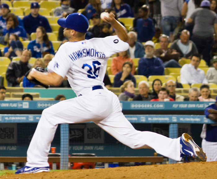 Blake Hawksworth